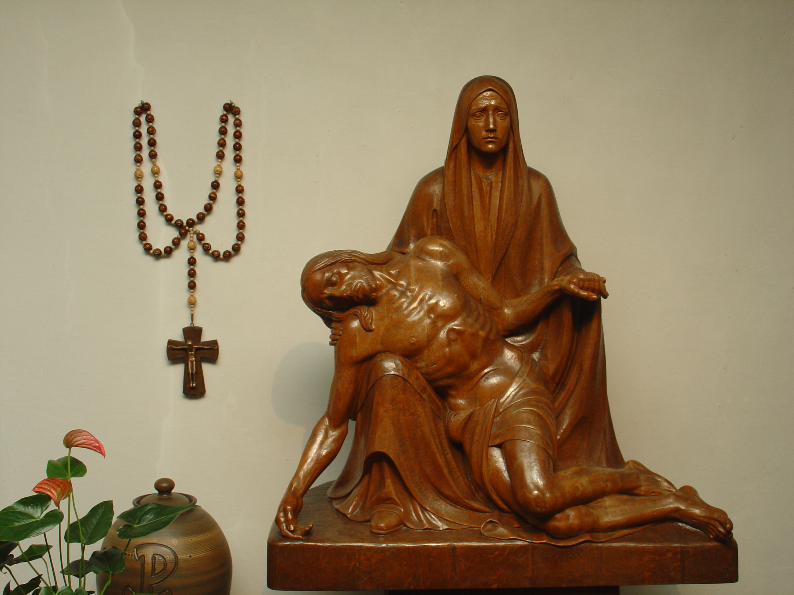 Pieta in der Pfarr- und Klosterkirche Rietberg-Varensell